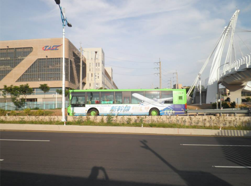 統聯客運原台中市公車150路新幹線公車，行駛國道3號，此路線於2015年7月28日起裁撤改站。